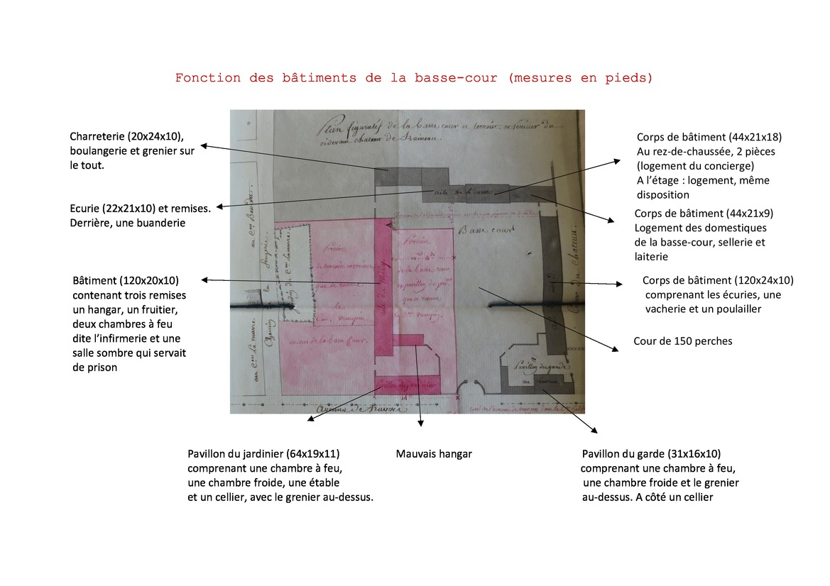 Fonction des bâtiments de la basse-cour du château de Tresneau sur un plan de 1797